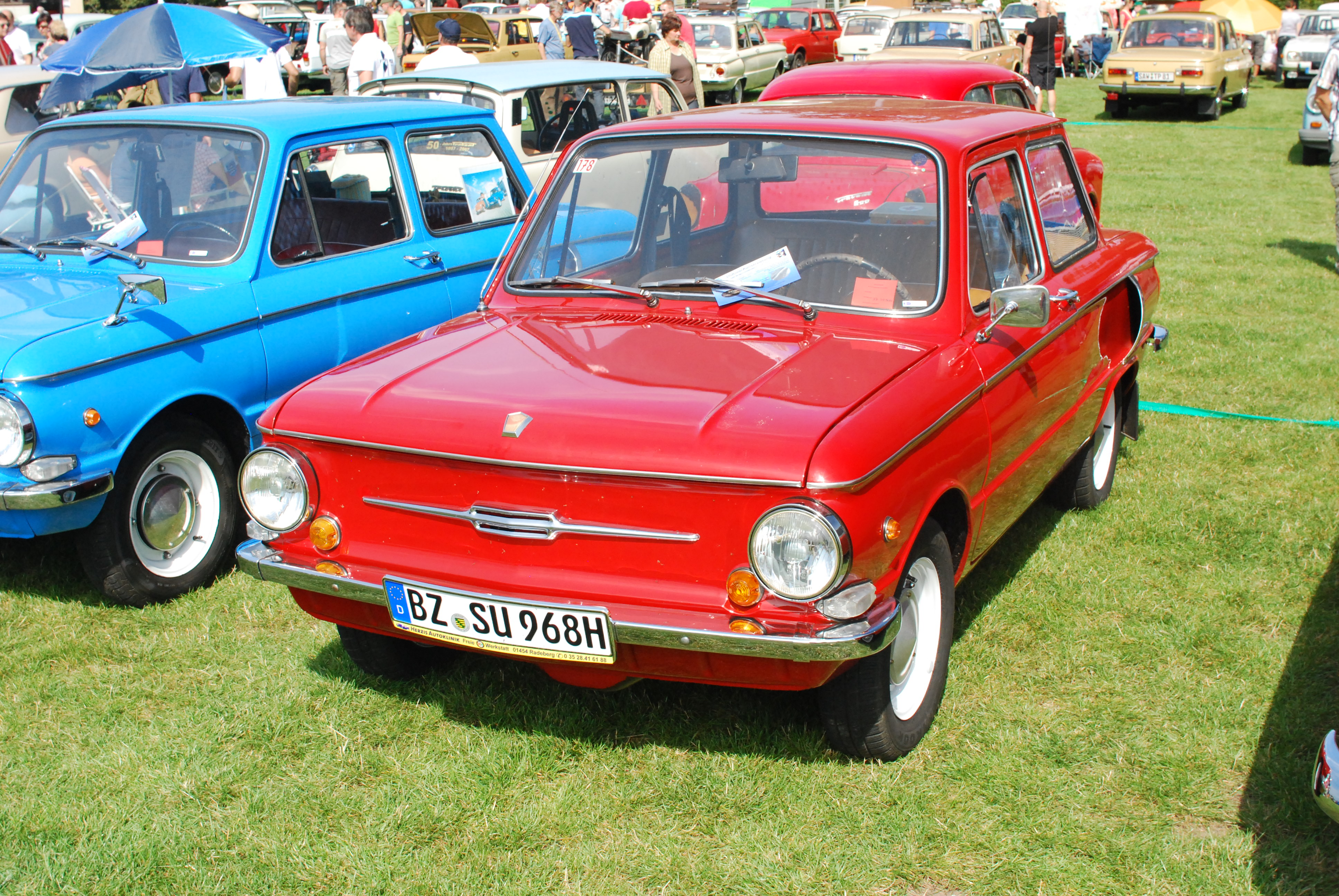 Fotos von der OMMMA 2011 am 03.09.2011 im Magdeburger Elbauenpark